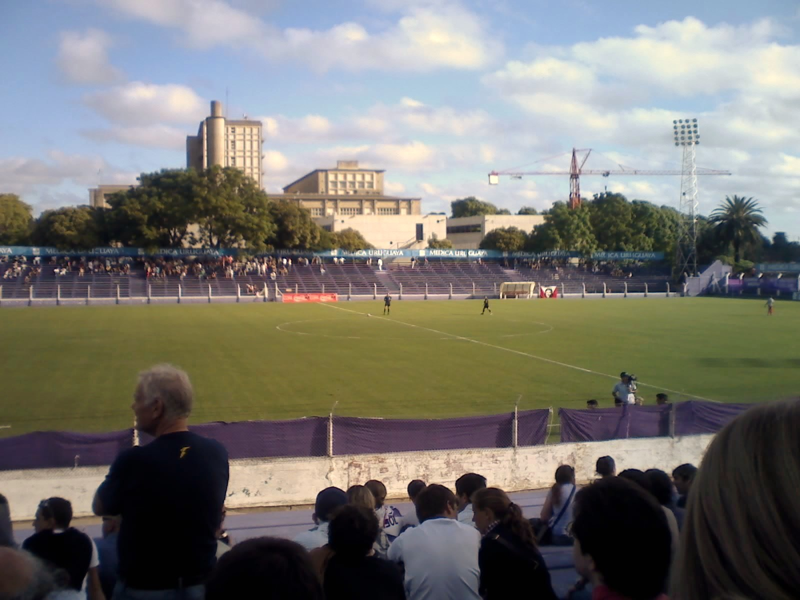 Previa del partido de Defensor Sporting contra Tacuarembo el 20 de marzo del año 2010. El partido finalizo con una derota de Defensor por 3 a 2.